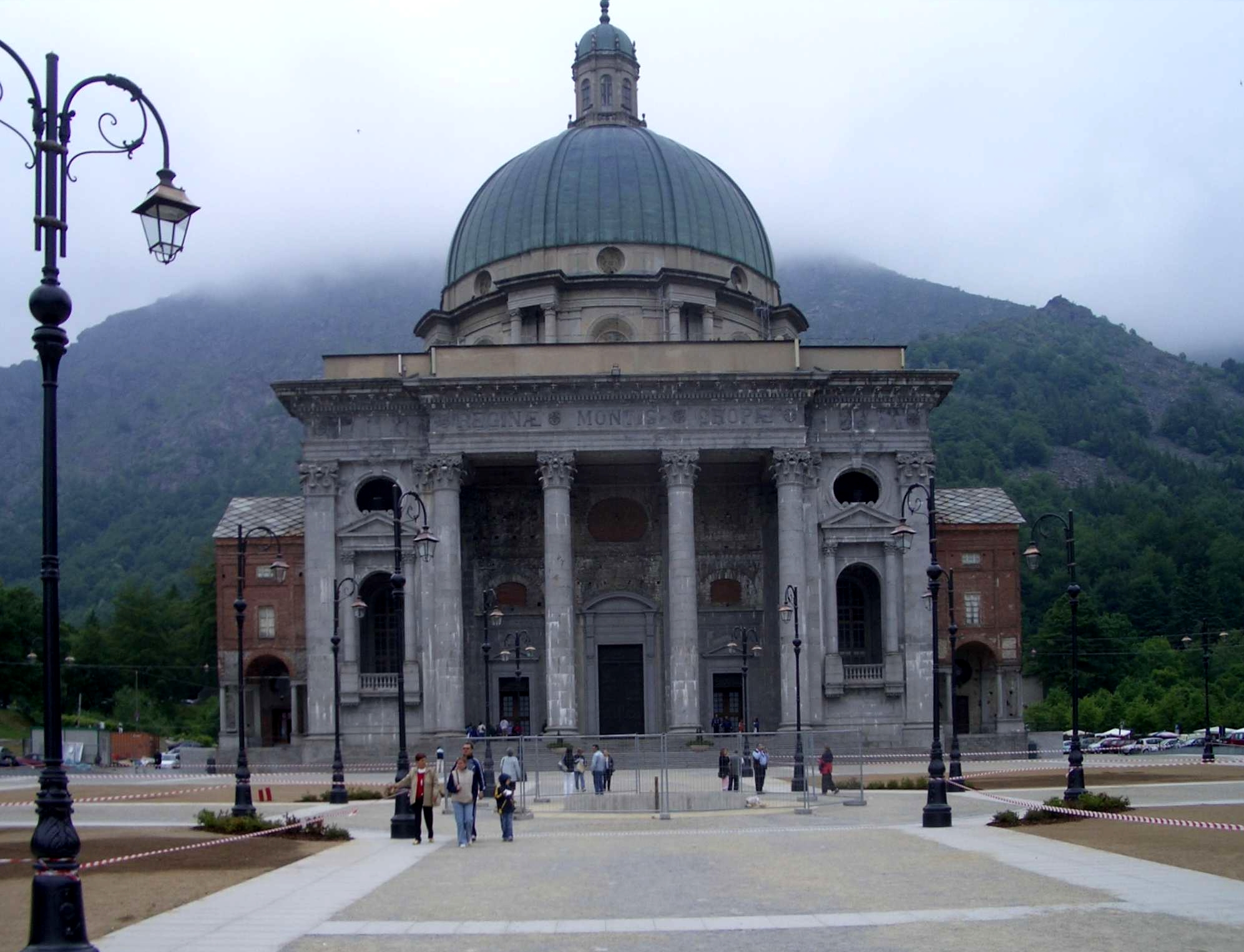 Photo of Santuario di Oropa (Chiesa Nuova), (Biella), Italy Biella